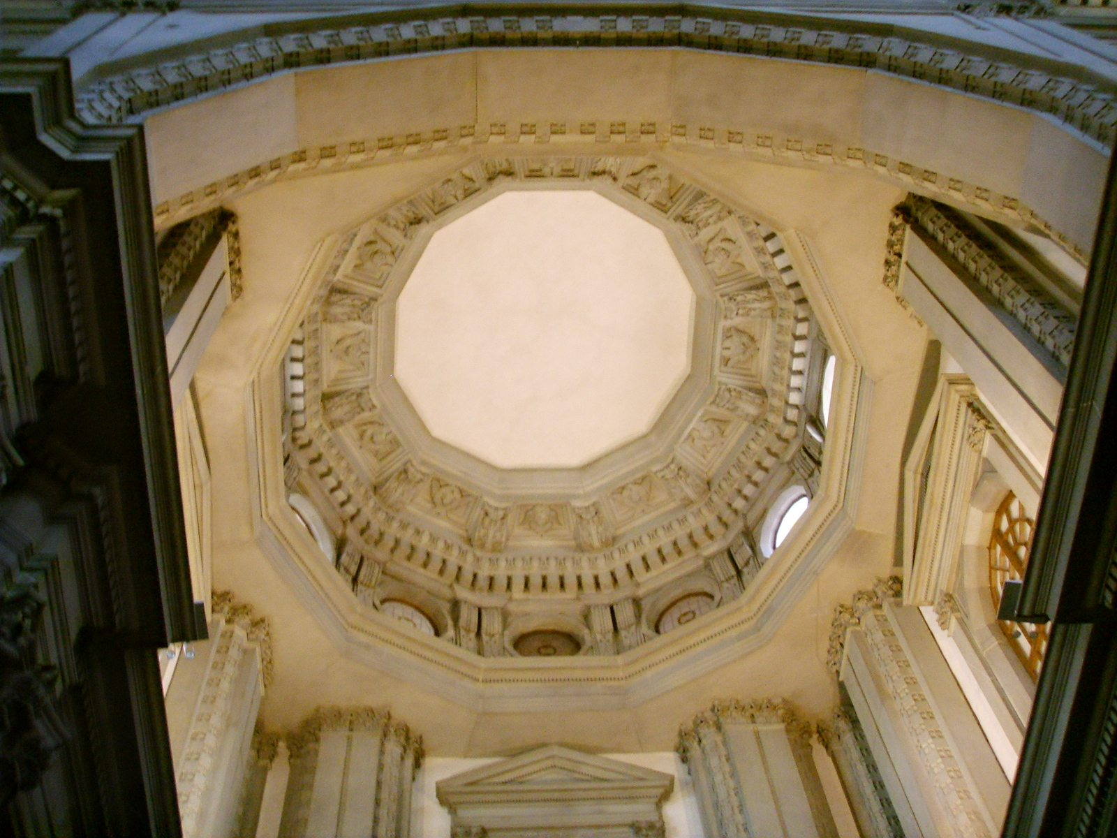 Santo Stefano al Ponte, la cupoletta